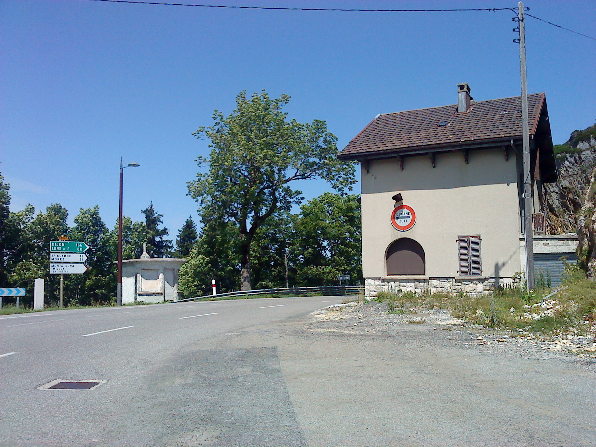 Ancien bureau de douane du col de la Faucille, commune de Gex, Ain, France.